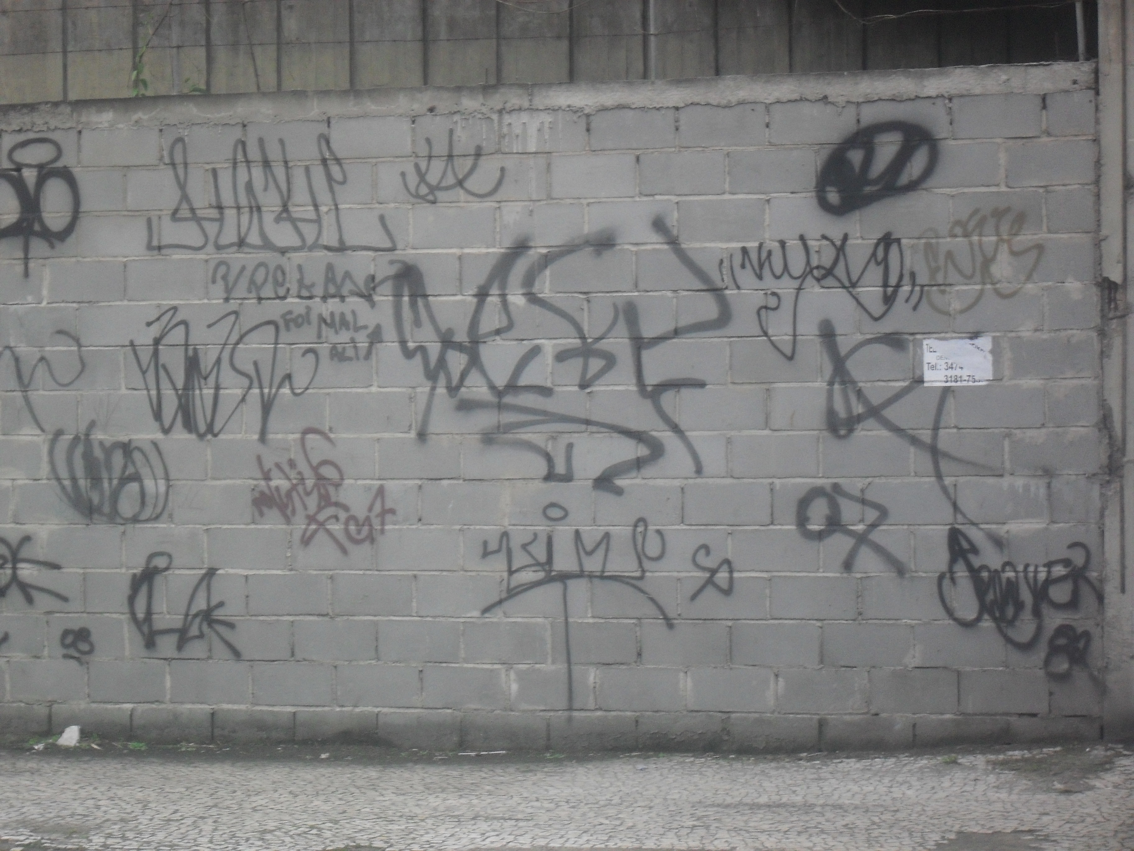 Um muro próximo ao Hotel Nacional no Rio de Janeiro, em São Conrado todo pichado.